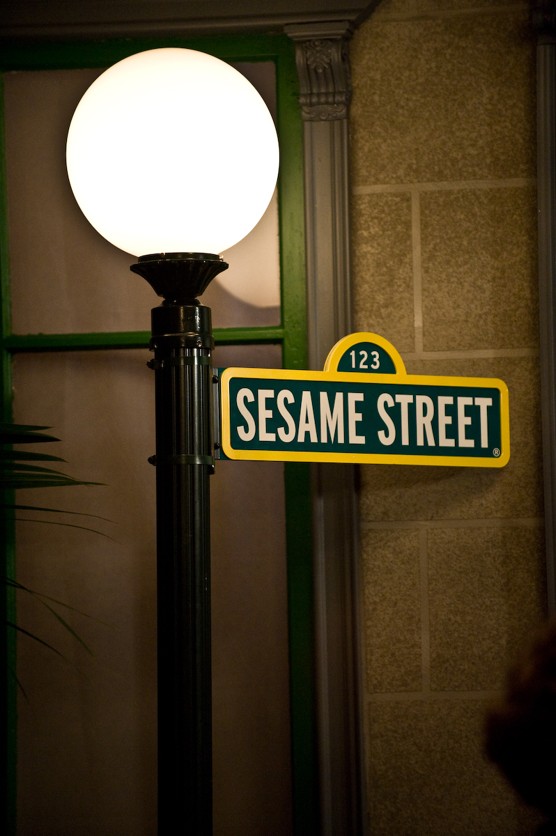 BlogHer 08 - Sesame Street Suite